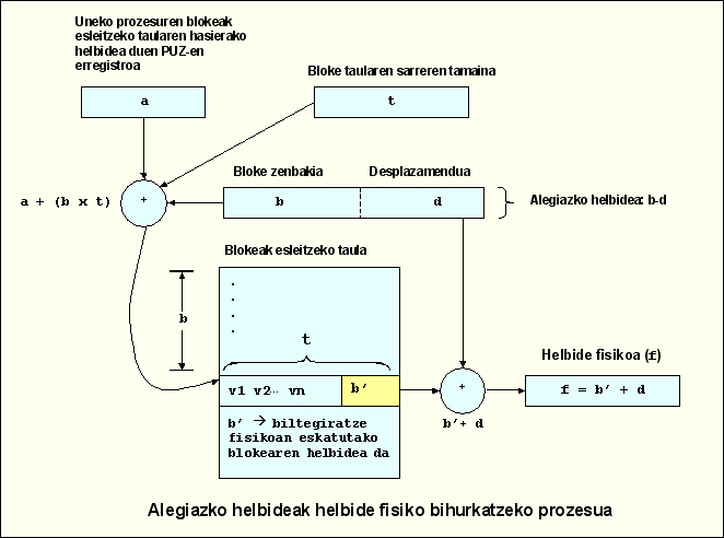 Alegiazko helbideak helbide fisikoen bihurketaren irudikapena.